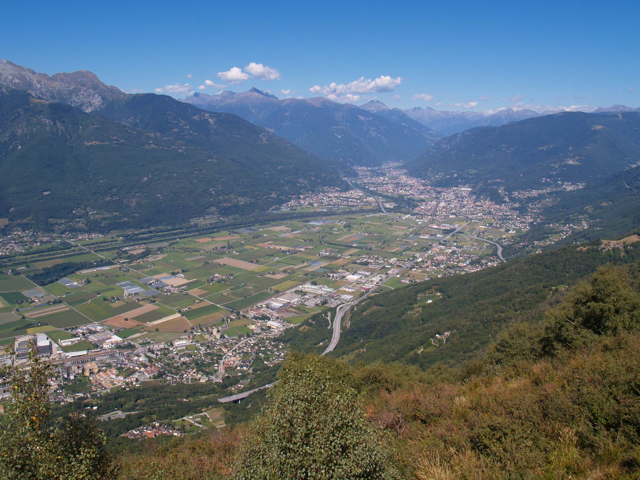 Veduta del Piano di Magadino (Canton Ticino, Svizzera), ripresa dalla Cima di Medeglia. Foto: Simone Müller